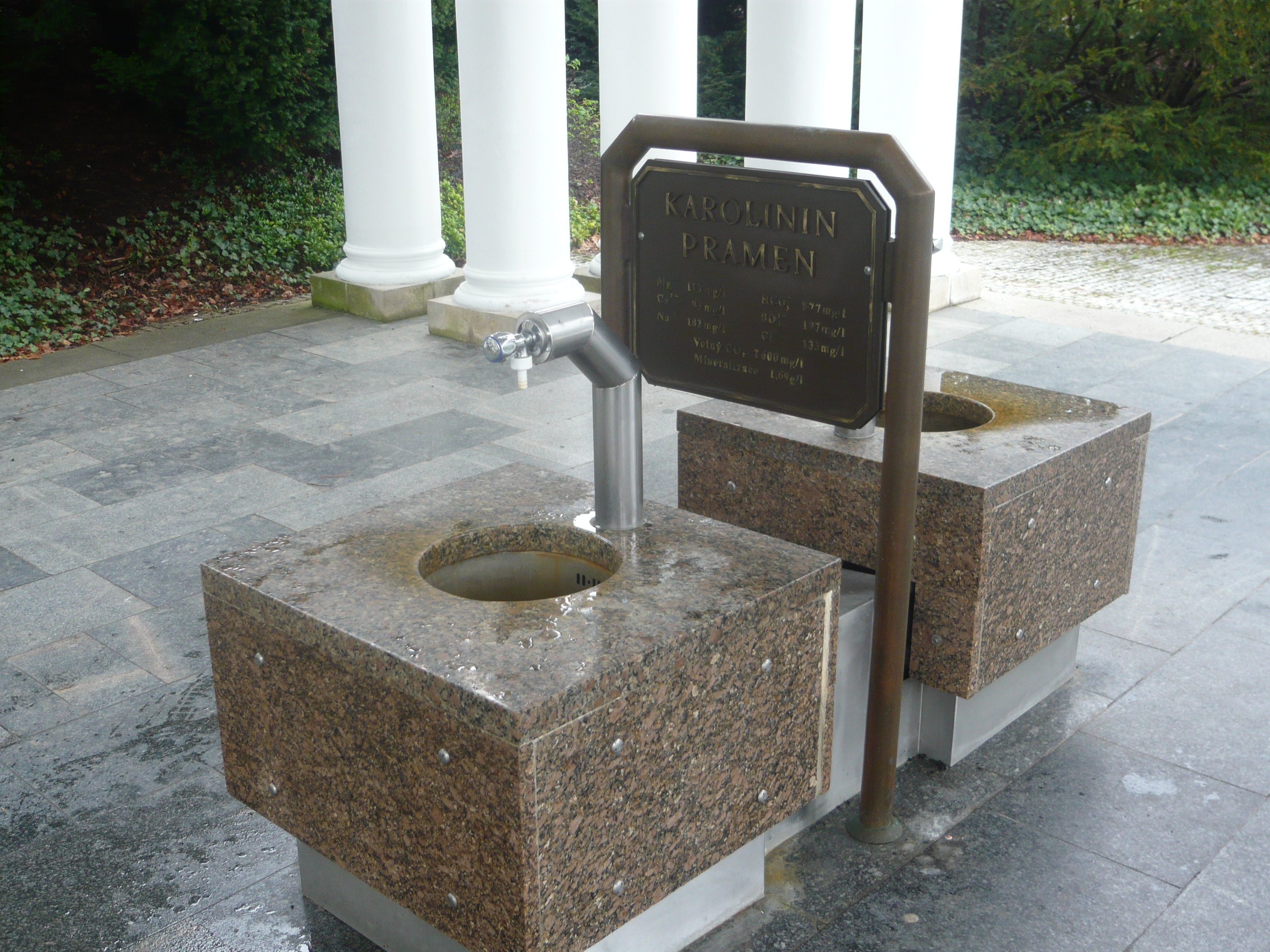 Karolinin pramen, Mariánské Lázně